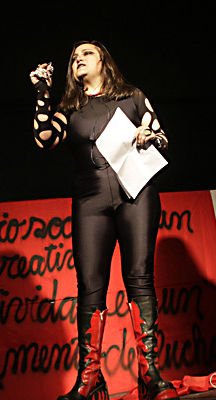 María Galindo en Buenos Aires, Argentina.